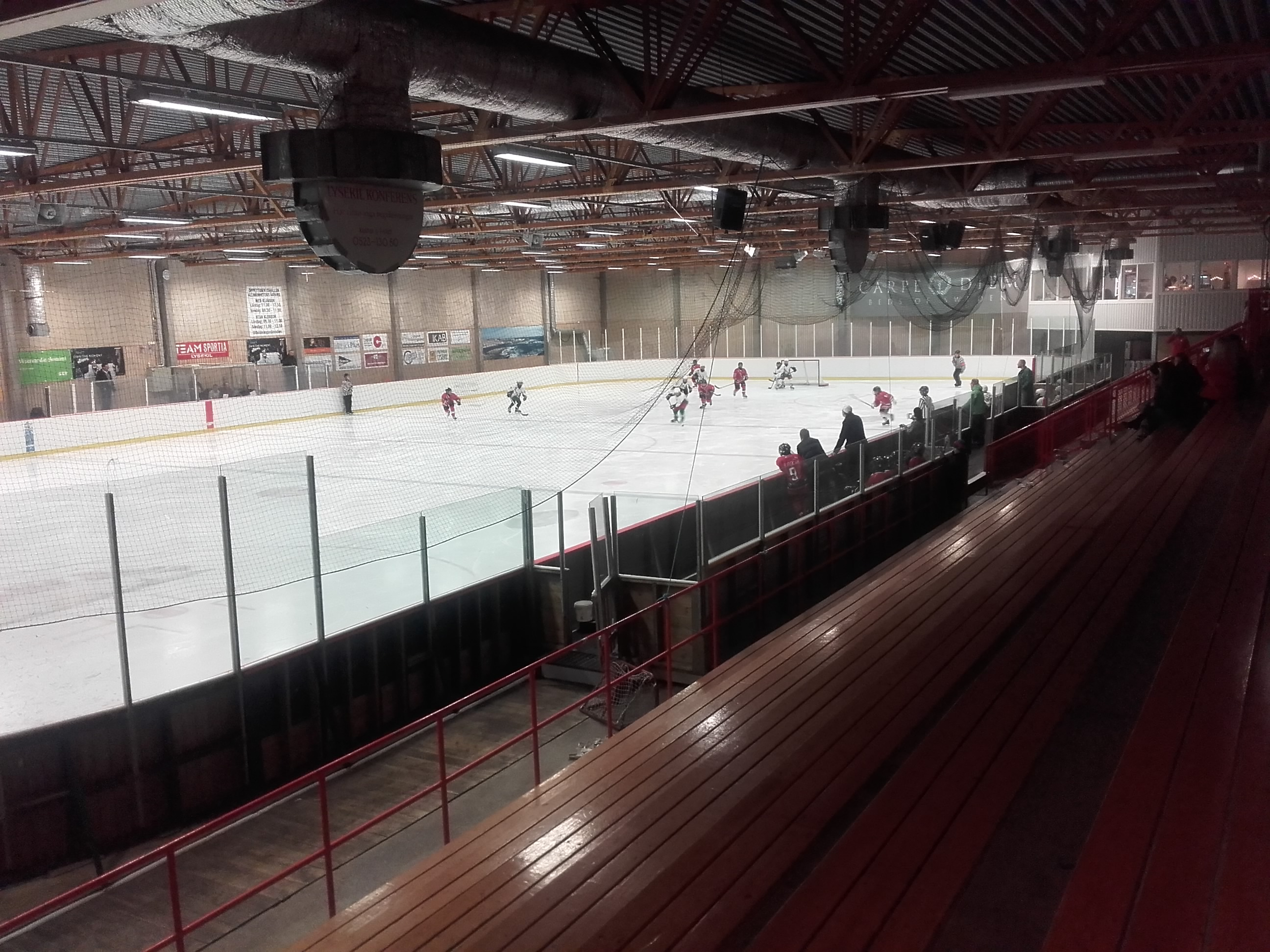 Gullmarsborgs ishall i Lysekil